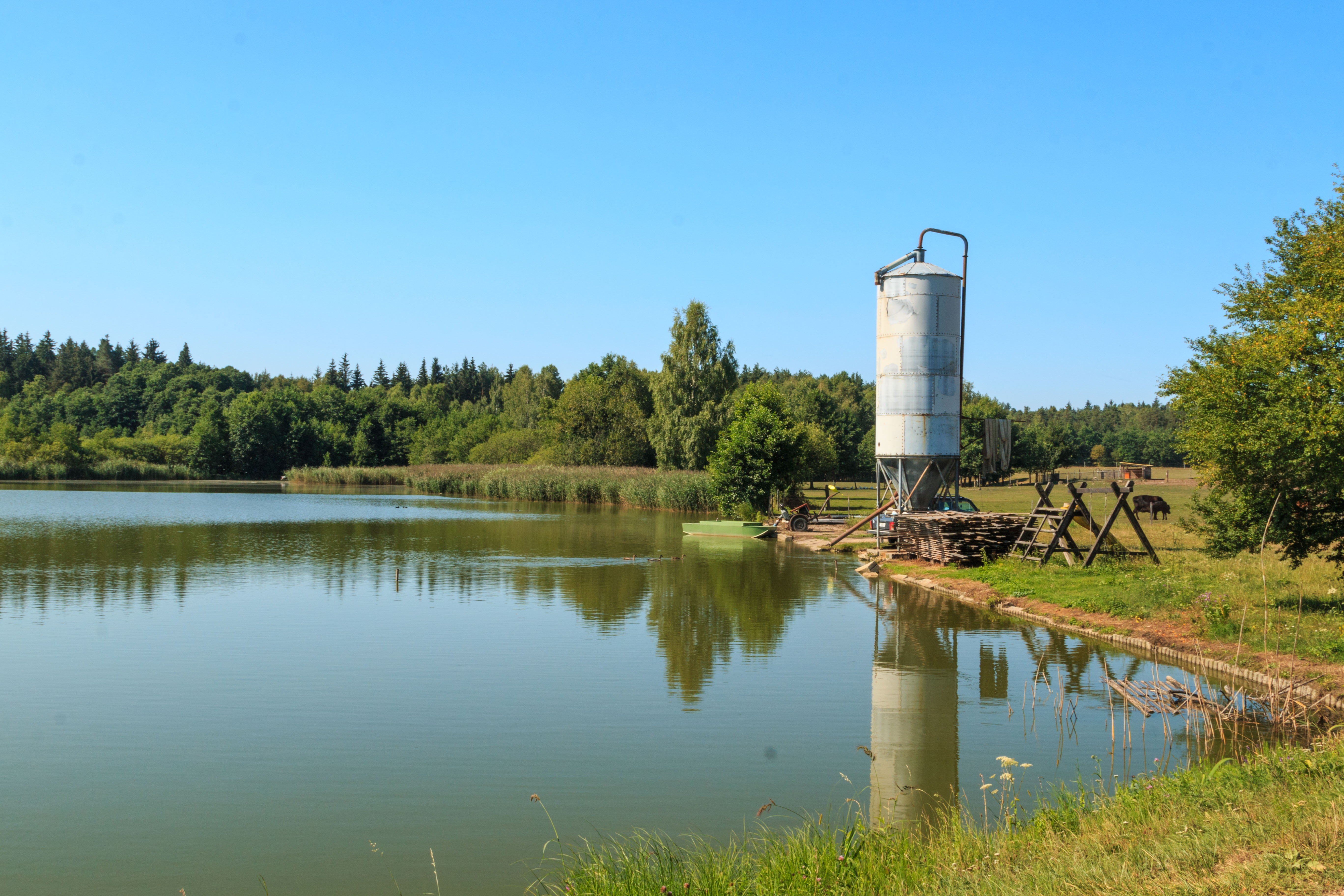 Rybník Malý Karlov Project: Vodstvo.